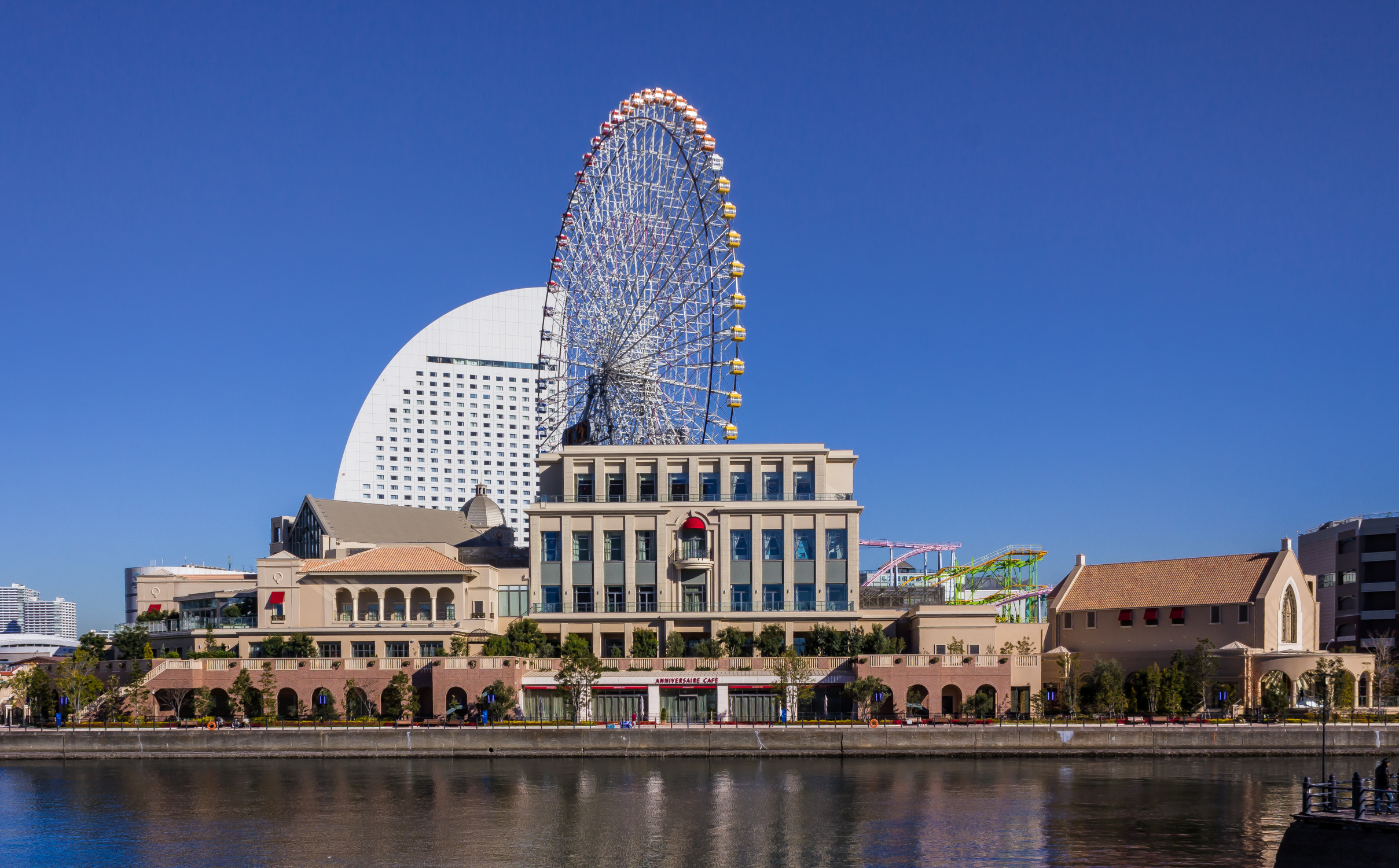 Anniversaire (Wedding hall) 旗艦店 - Minatomirai Yokohama